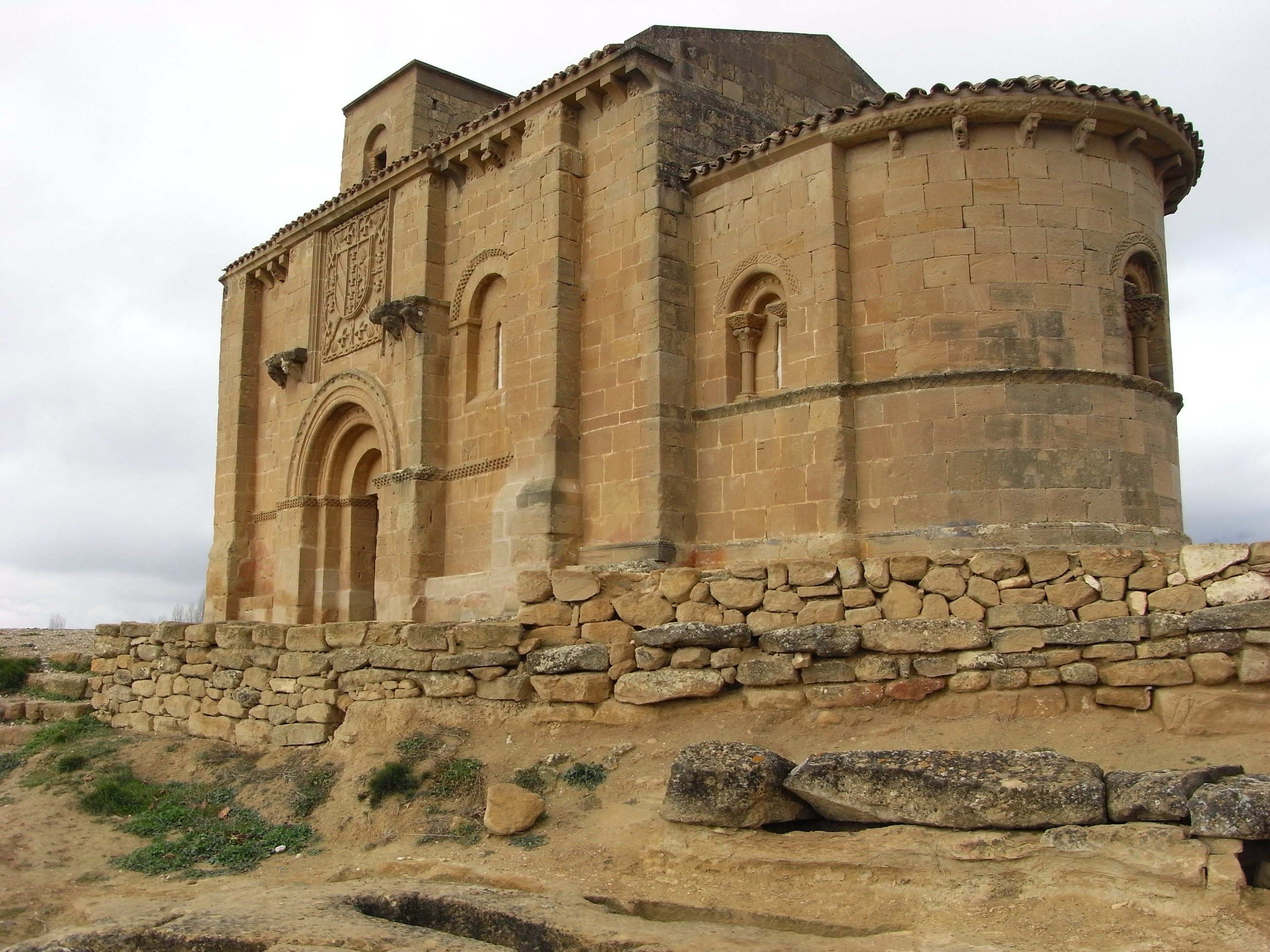 Ermita de Santa María de La Piscina en La Rioja (España) - Ábside y portada sur